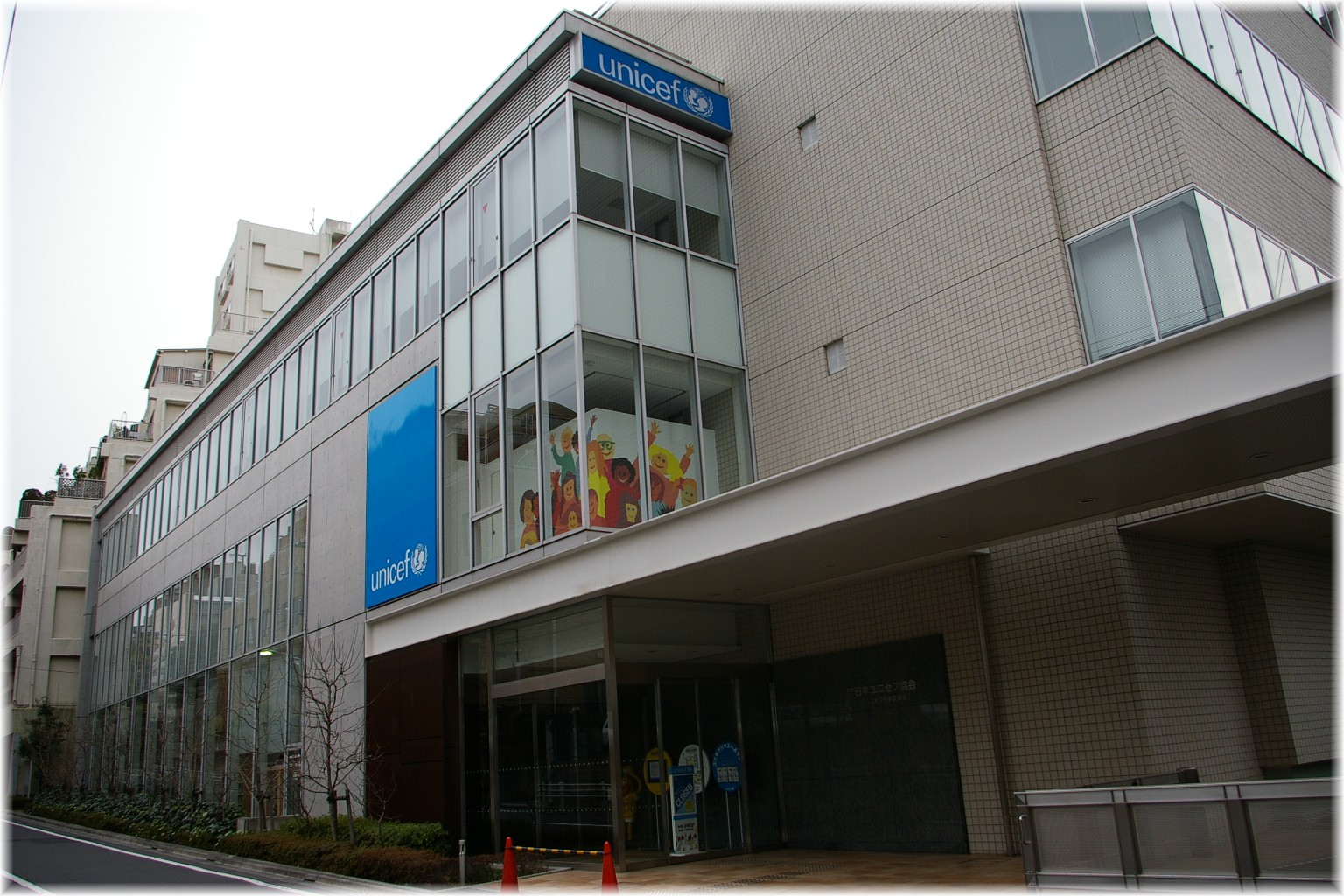 日本の東京都港区高輪にある財団法人日本ユニセフ協会ユニセフハウス。